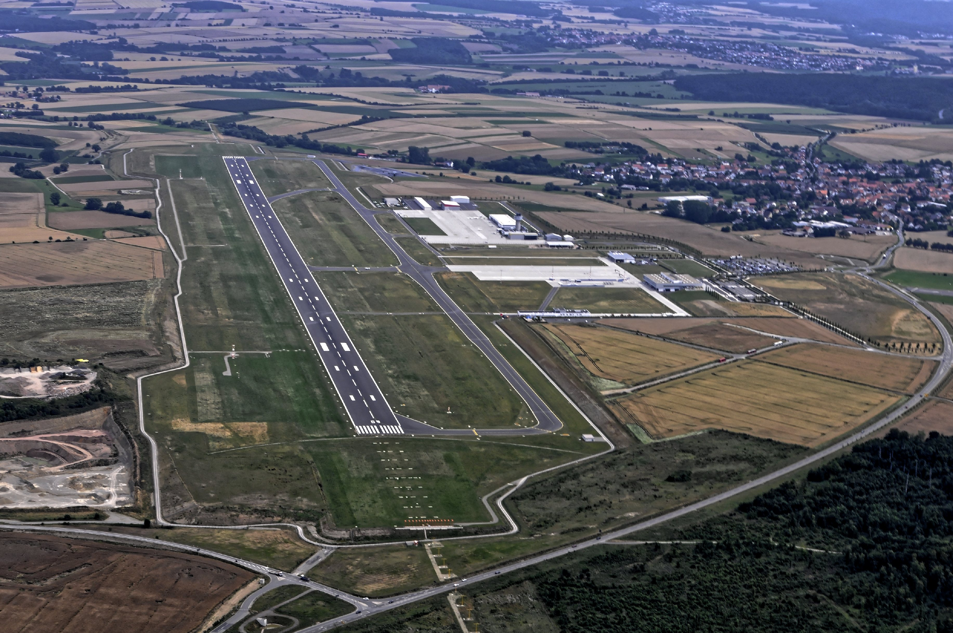 Bilder vom Flug Nordholz-Hammelburg 2015: Flughafen Kassel-Calden